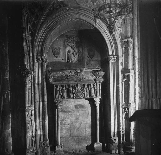 Sepulcre del bisbe a la catedral de Barcelona. Josep Salvany i Blanch (1920)